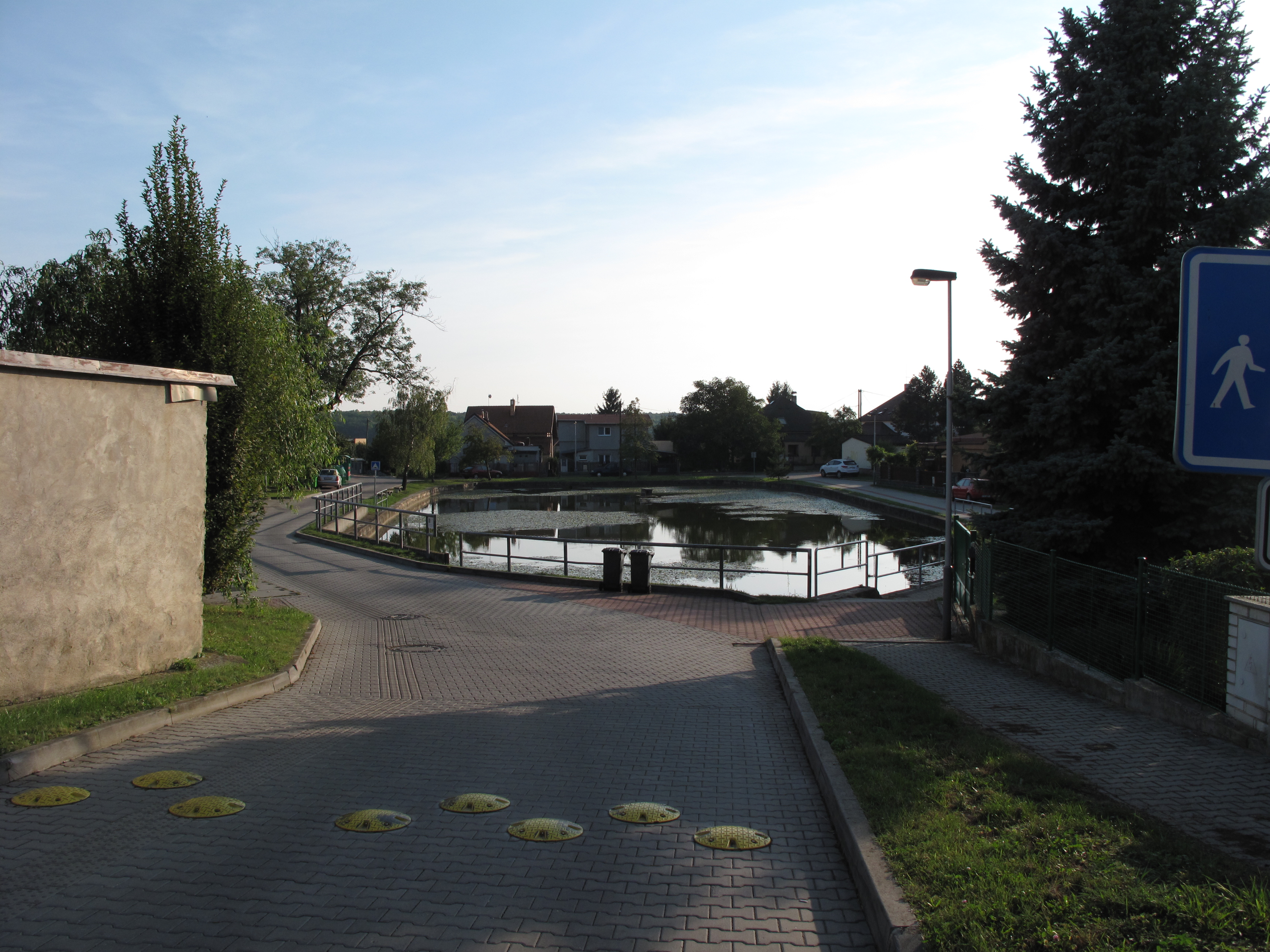 Starý rybník. Praha, Česká republika.